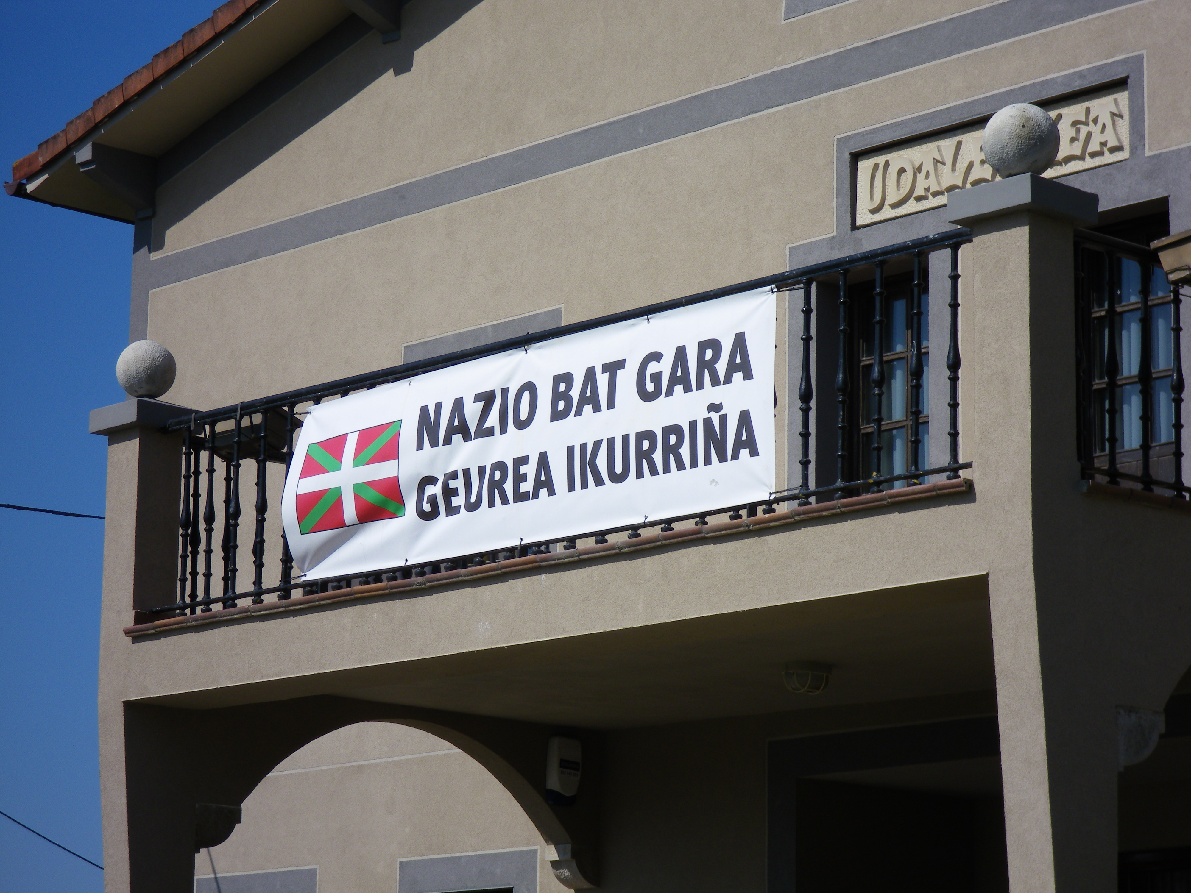 Gatikako udaletxea, Gatika, Bizkaia, Euskal Herria.